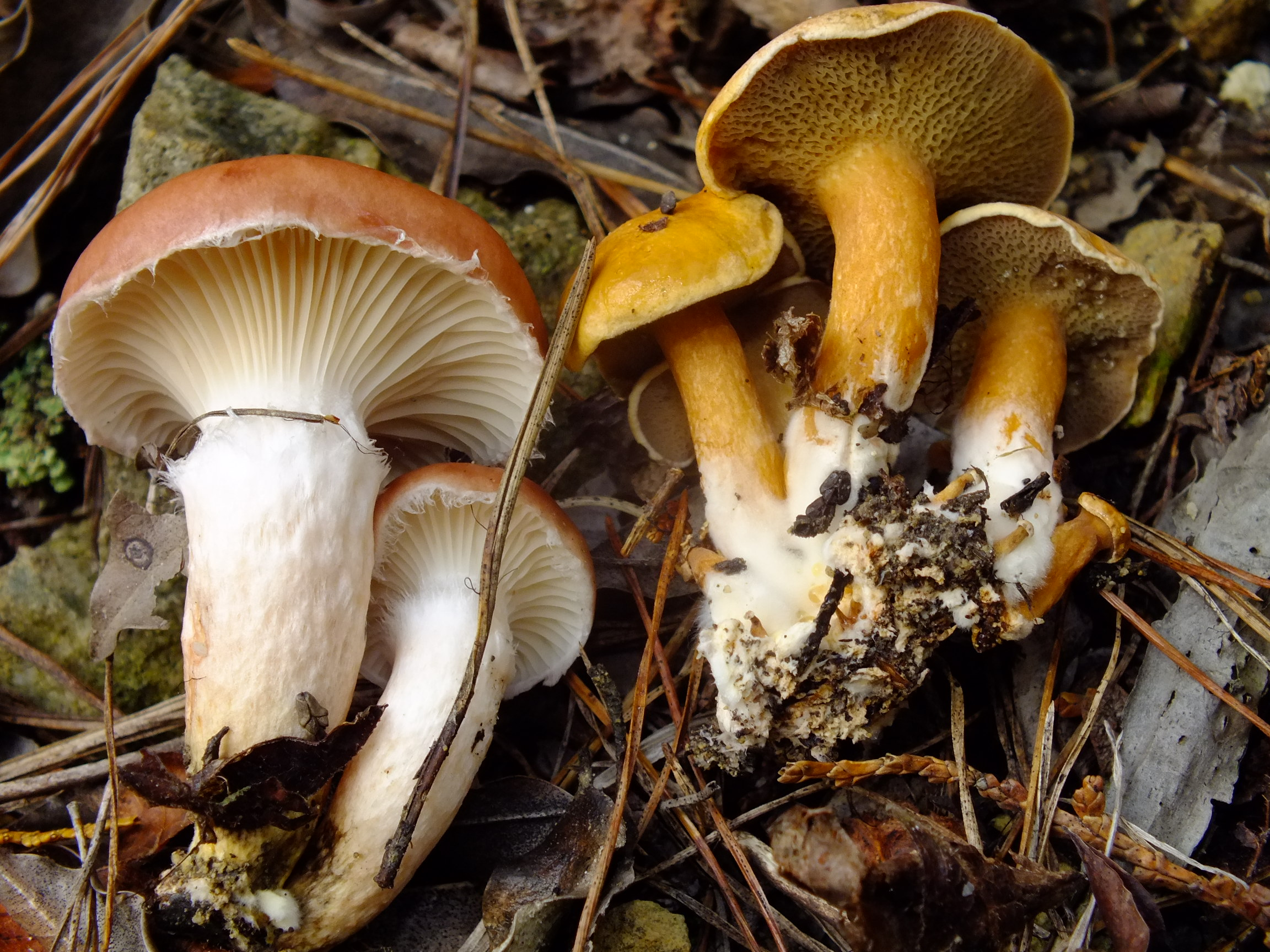 Suillus bovinus & Gomphidius roseus アミタケとオウギタケ 篠山市盃ヶ岳にて